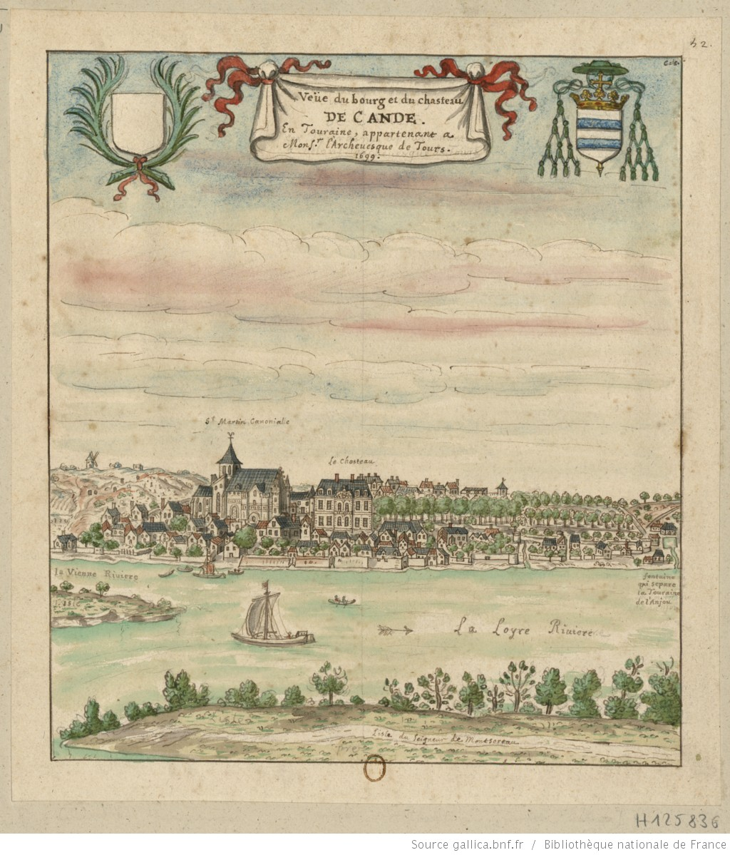 Vue de Candes ; aquarelle de Louis Bourdan (collection Gaignières)